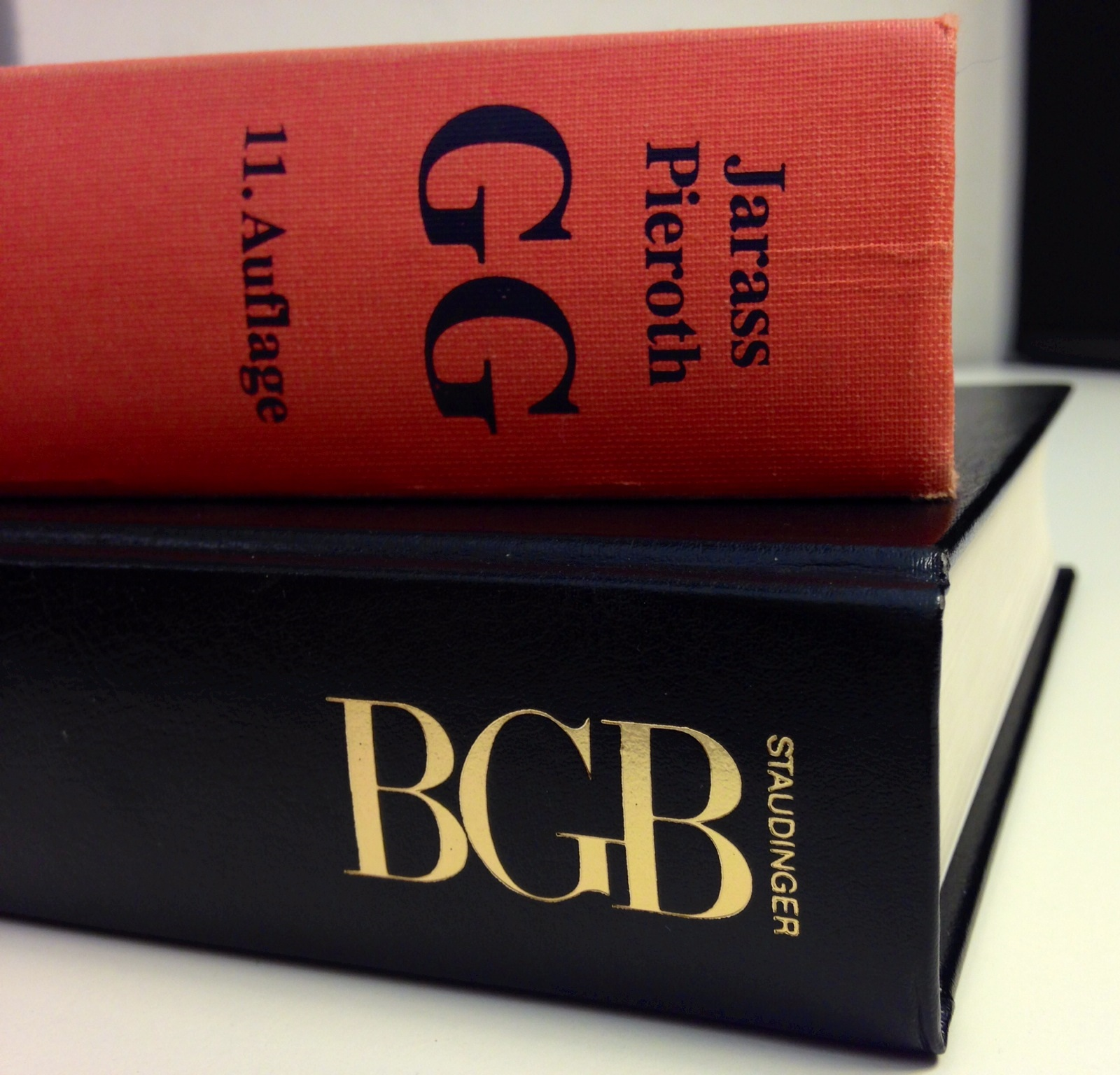 Zwei deutsche Gesetzeskommentare: Der Grundgesetzkommentar von Hans D. Jarass und Bodo Pieroth und ein Band des BGB-Kommentars Staudinger.